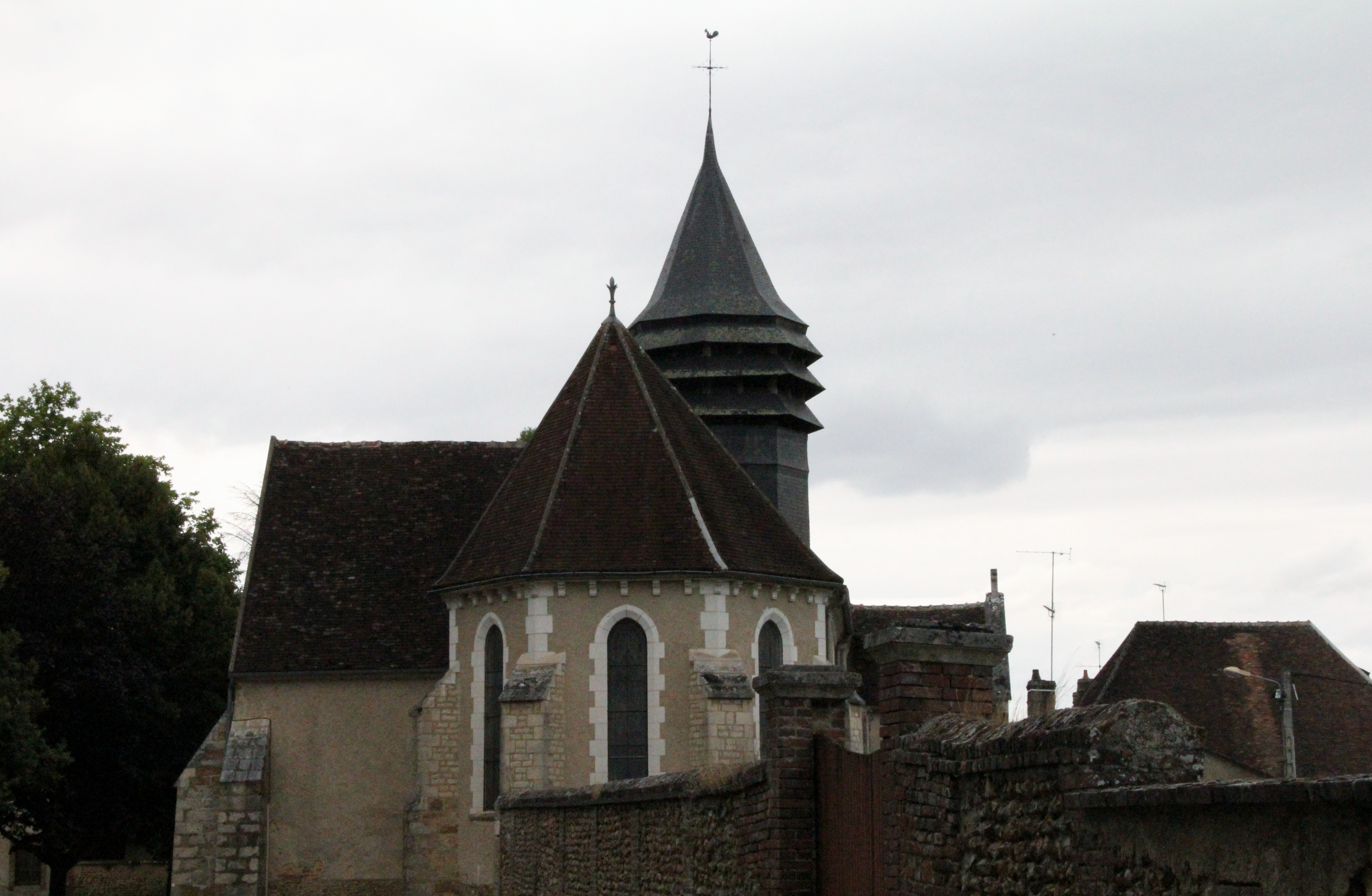 Église Saint-Martin de Granchamp, commune de Charny Orée de Puisaye (89).